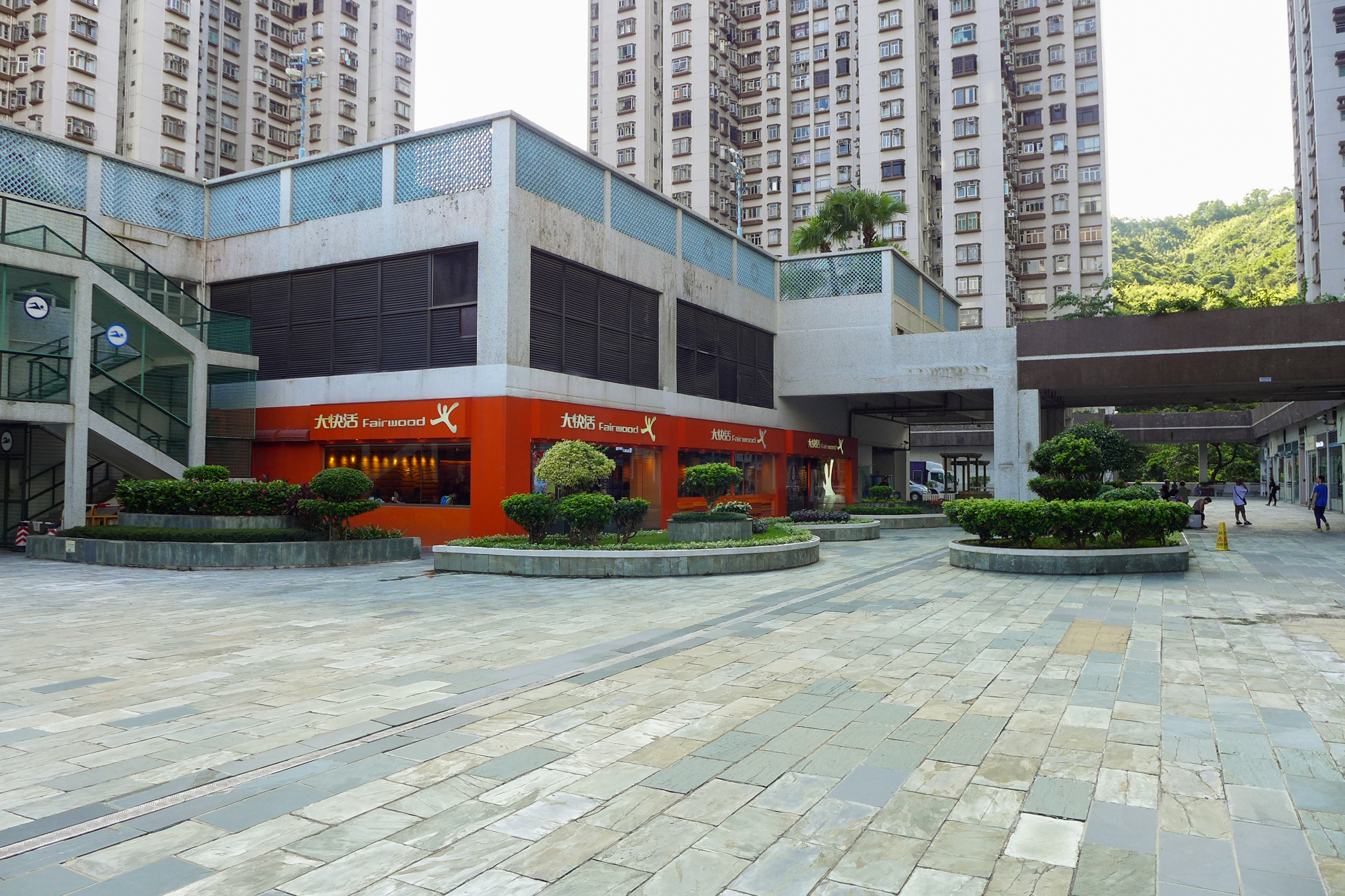 Mayfair Gardens Shops view